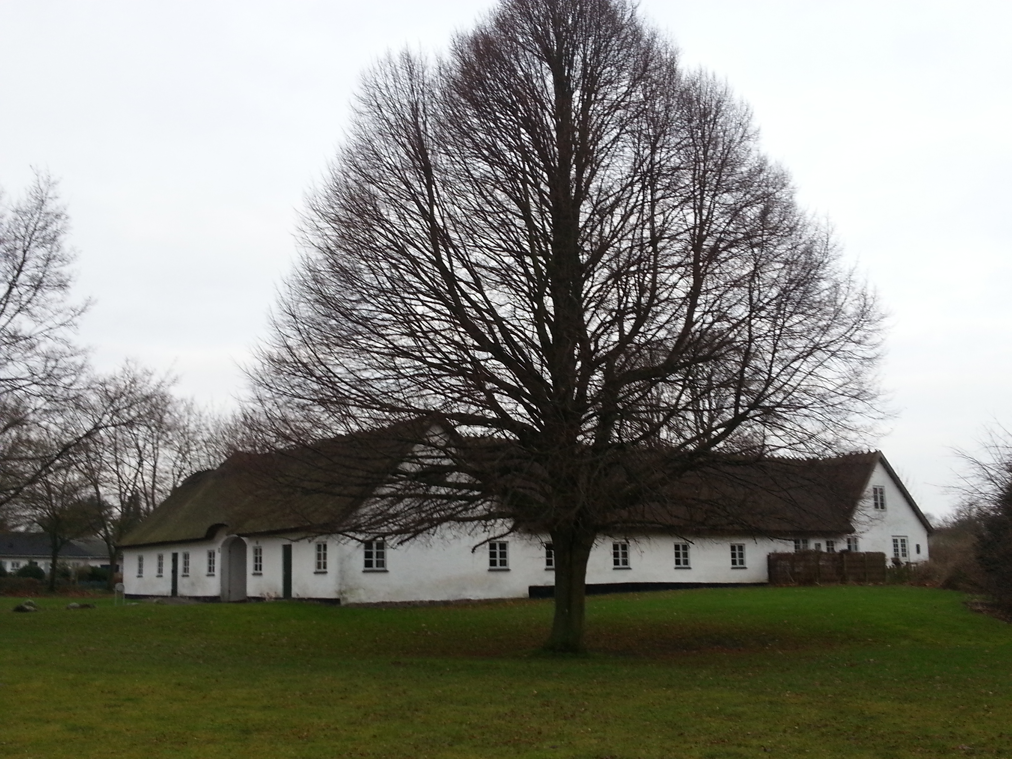 Egegården i Espergærde